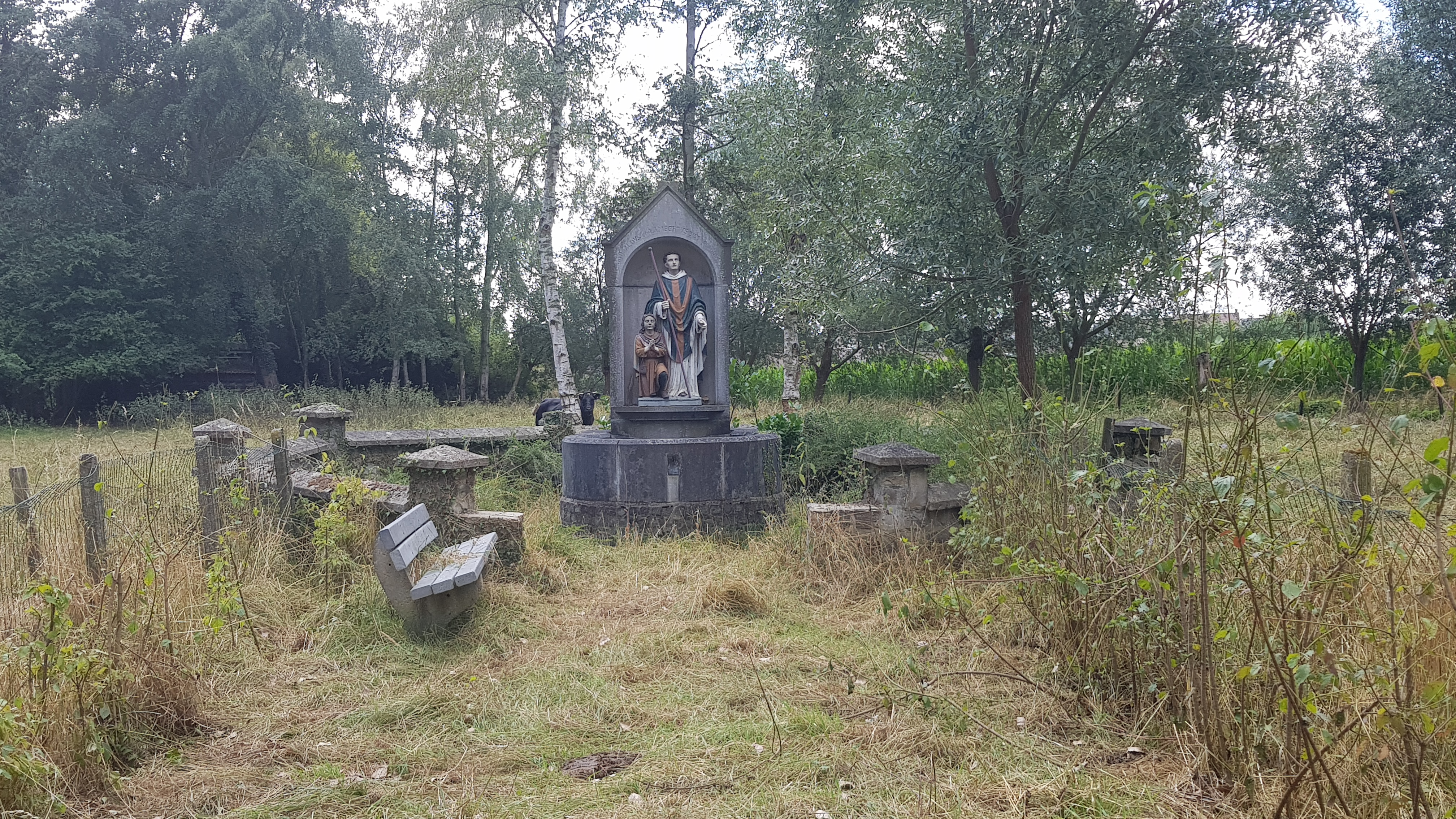 Sint-Lambertusbron, Wintershoven, Kortessem, België This photo of immovable heritage has been taken in the Flemish Region